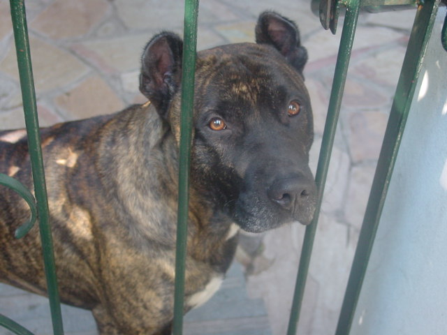 Perro Cimarrón Uruguayo, raza autóctona del Uruguay. Ejemplar llamado "Boquerón de Quilligan". Requerida para su uso la mencion del nombre de pedigree del animal.